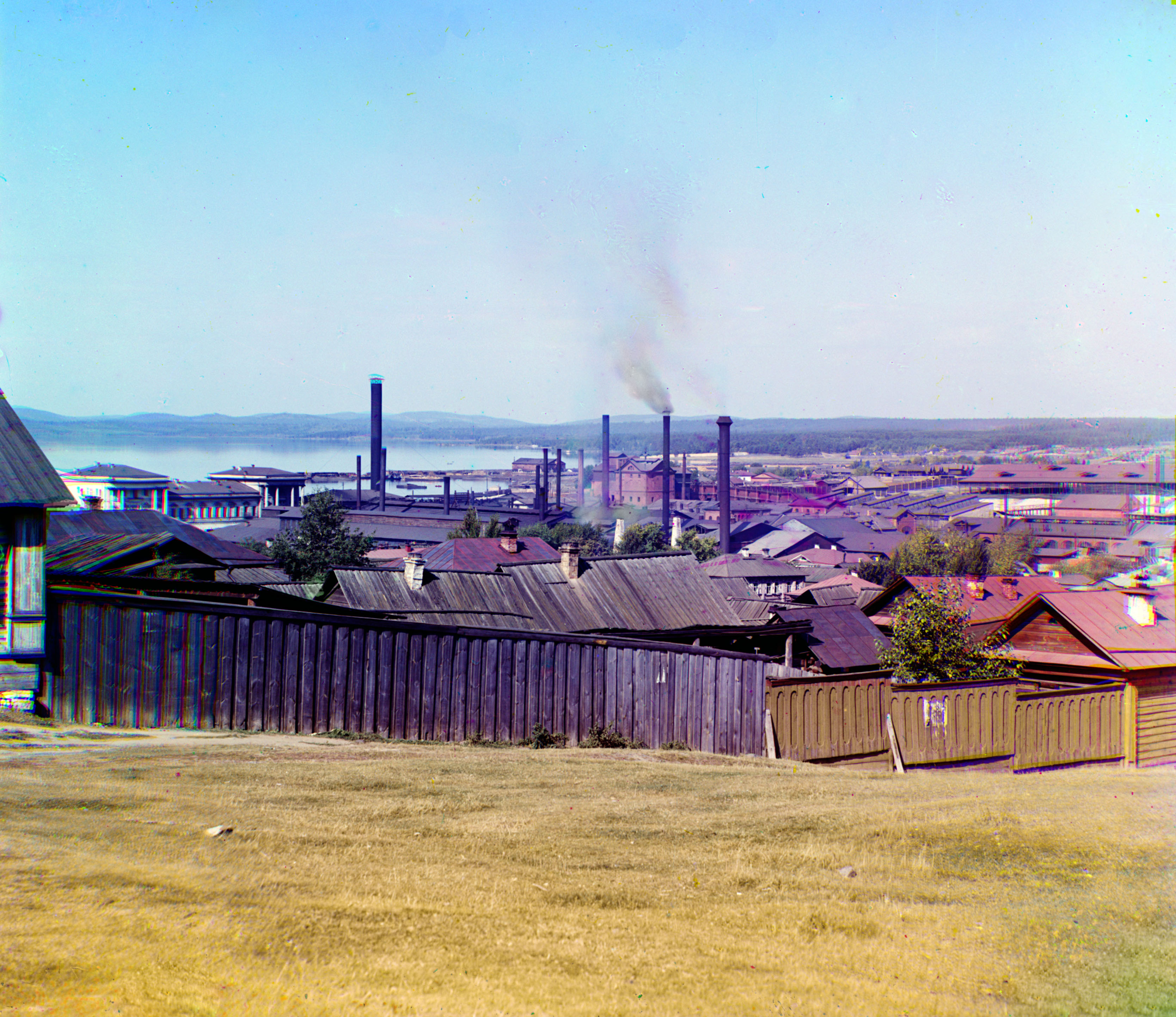 ВИЗ и посёлок ВИЗа